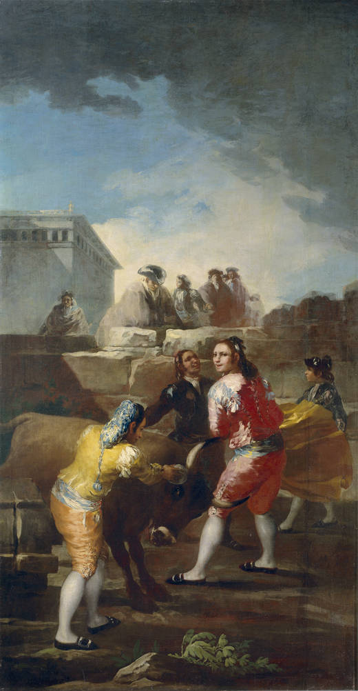 La novillada.title QS:P1476,es:"La novillada." label QS:Les,"La novillada."